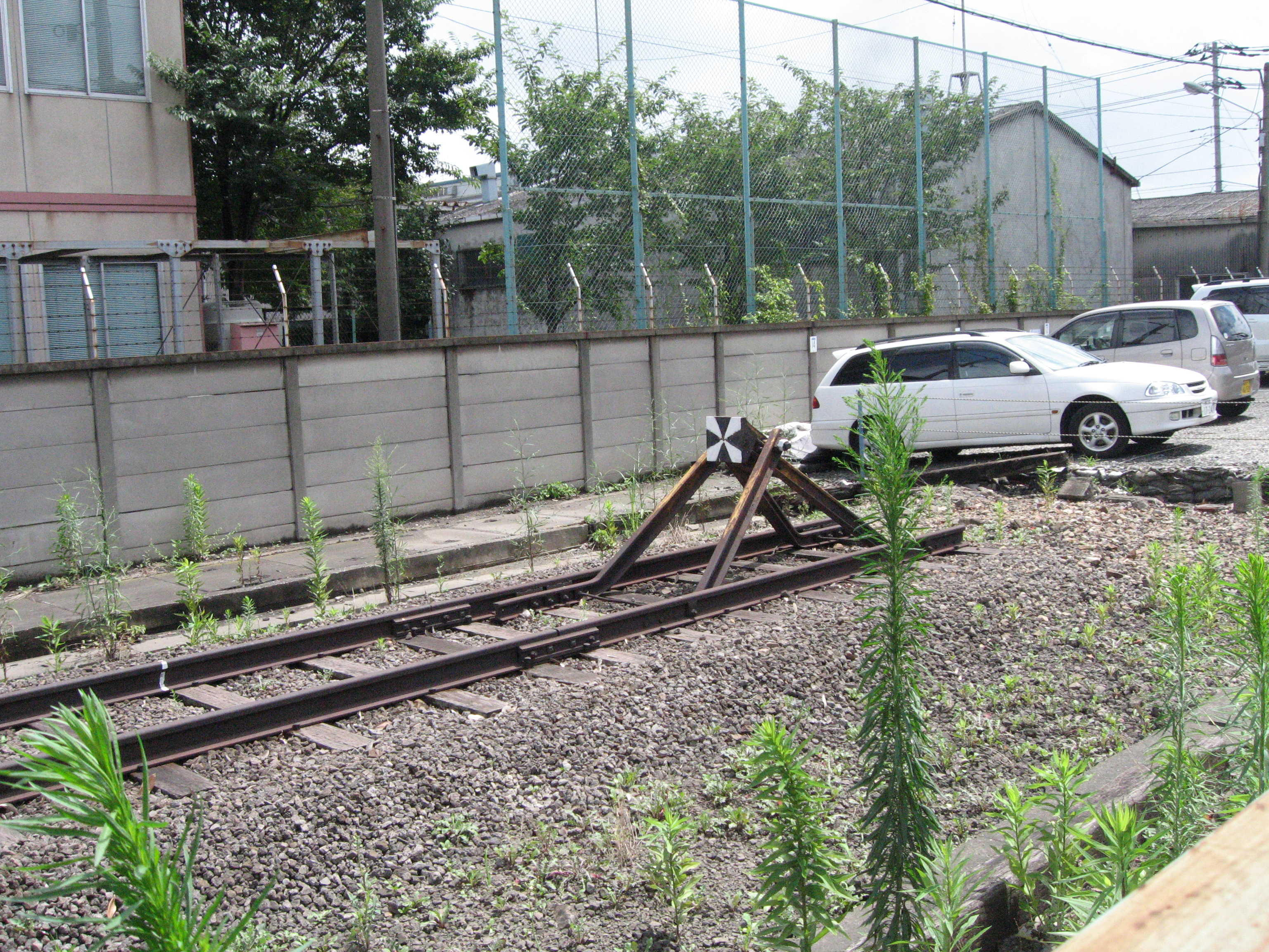 神奈川臨海鉄道水江線の終点